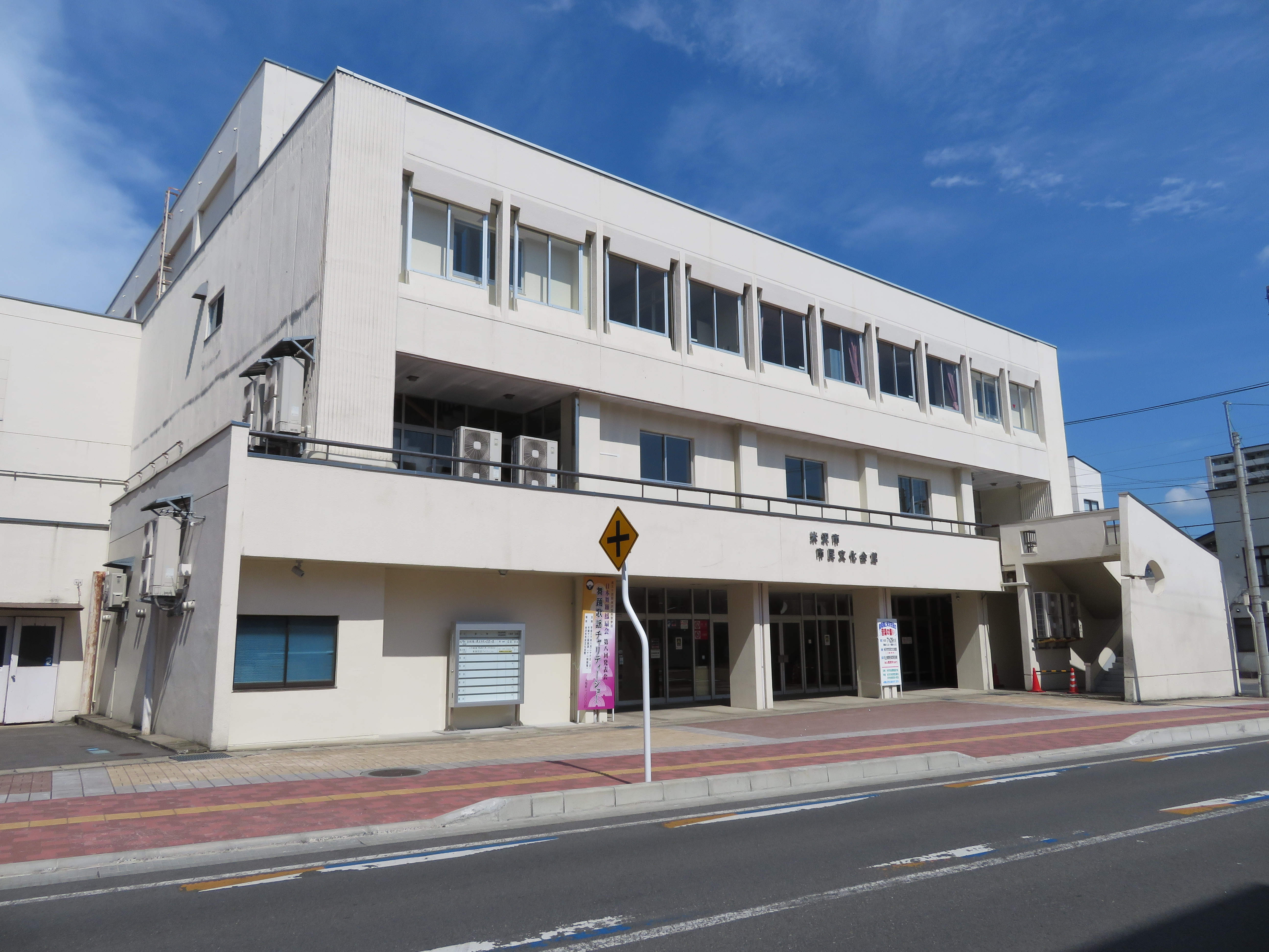 米沢市市民文化会館 Canon PowerShot SX720 HS